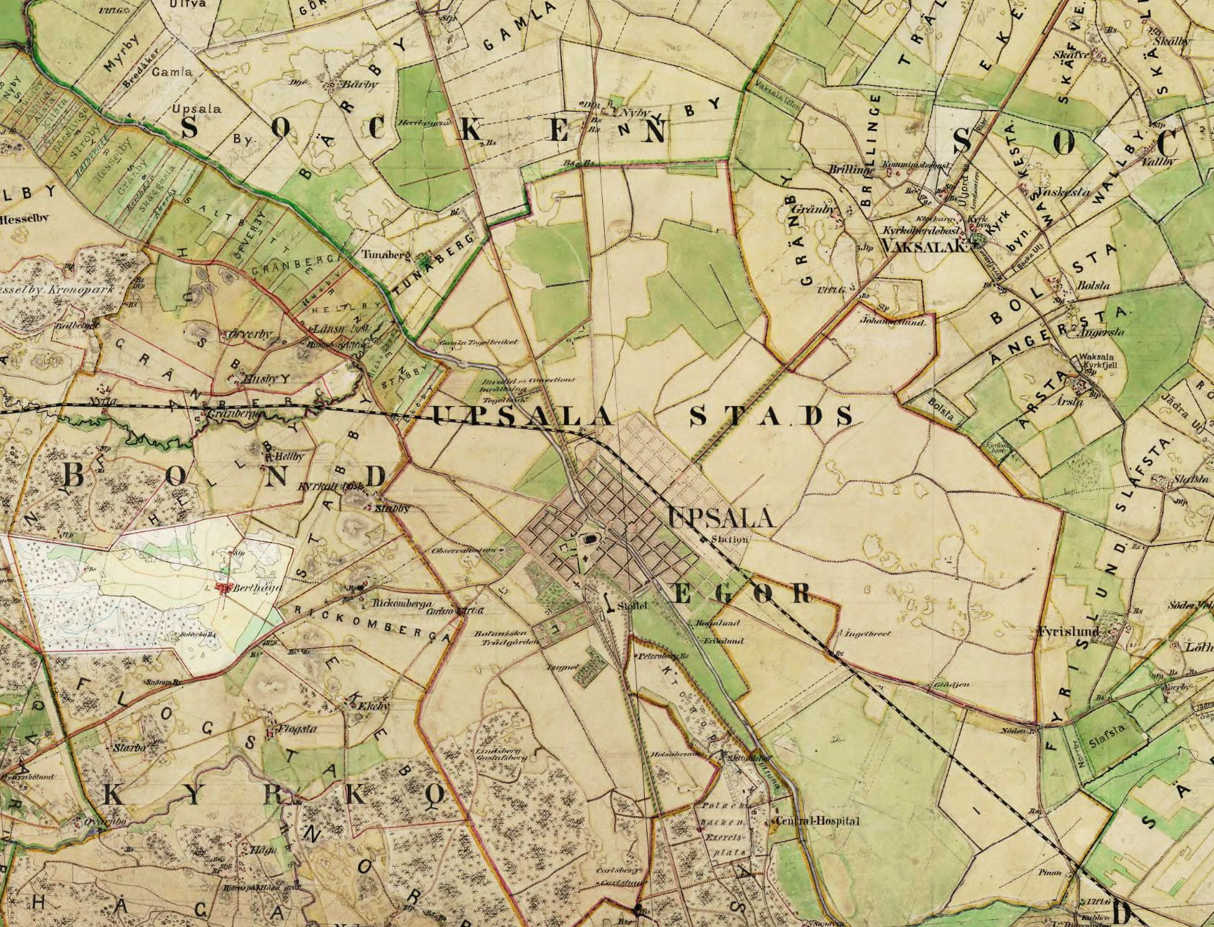 Upsala stads ägor